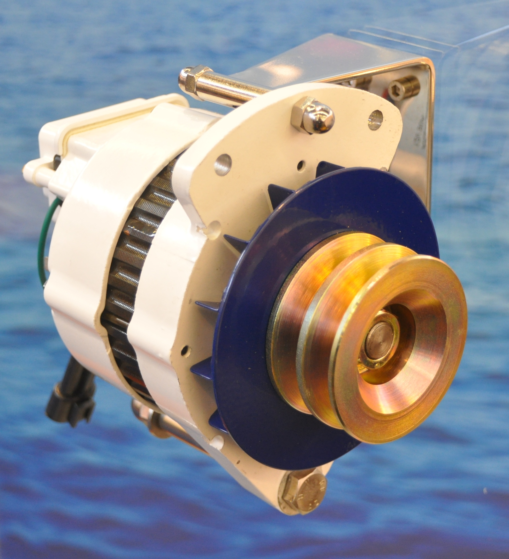 Scheepsmaterialen op de METS 2011 in de RAI te Amsterdam